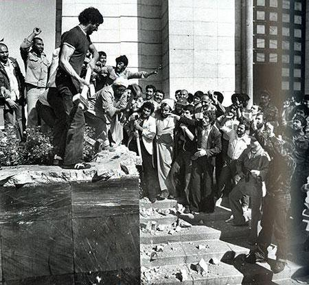 تصویر تخریب مقبره رضاشاه در روز 21 اردیبهشت 1359